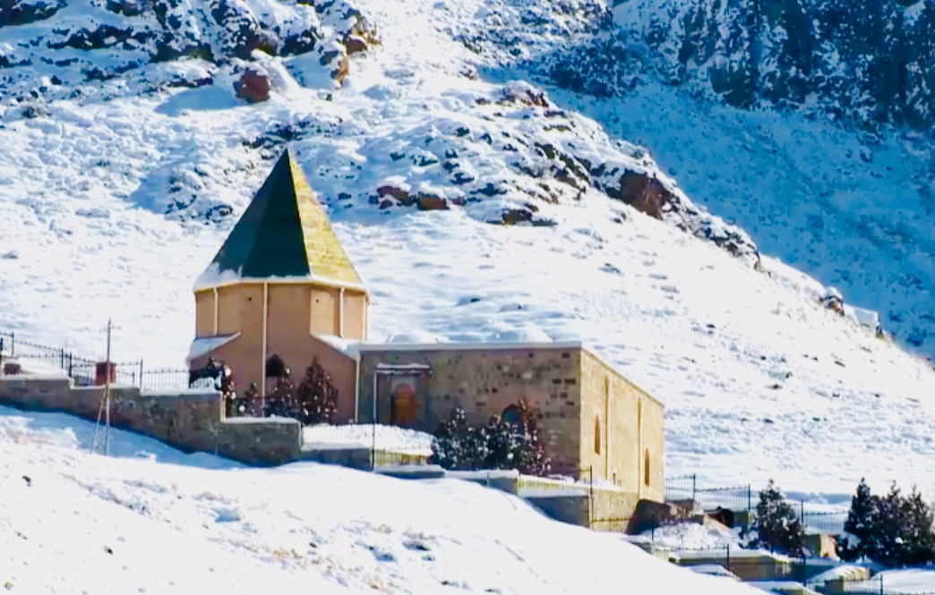 Əlincə xanəgahı, Nəimi türbəsi